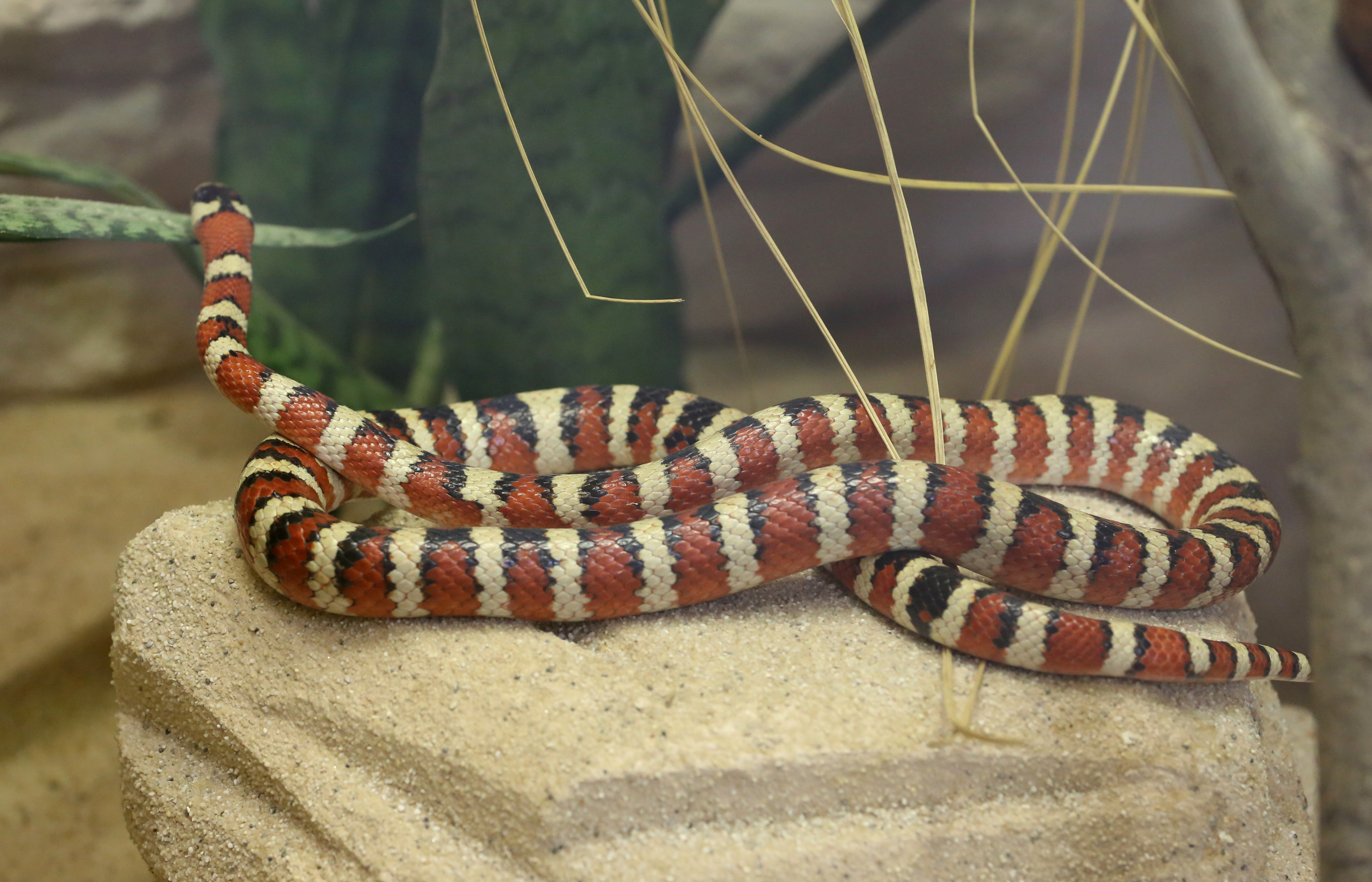 Zoo Augsburg, Berg-Königsnatter, Lampropeltis pyromelana woodini